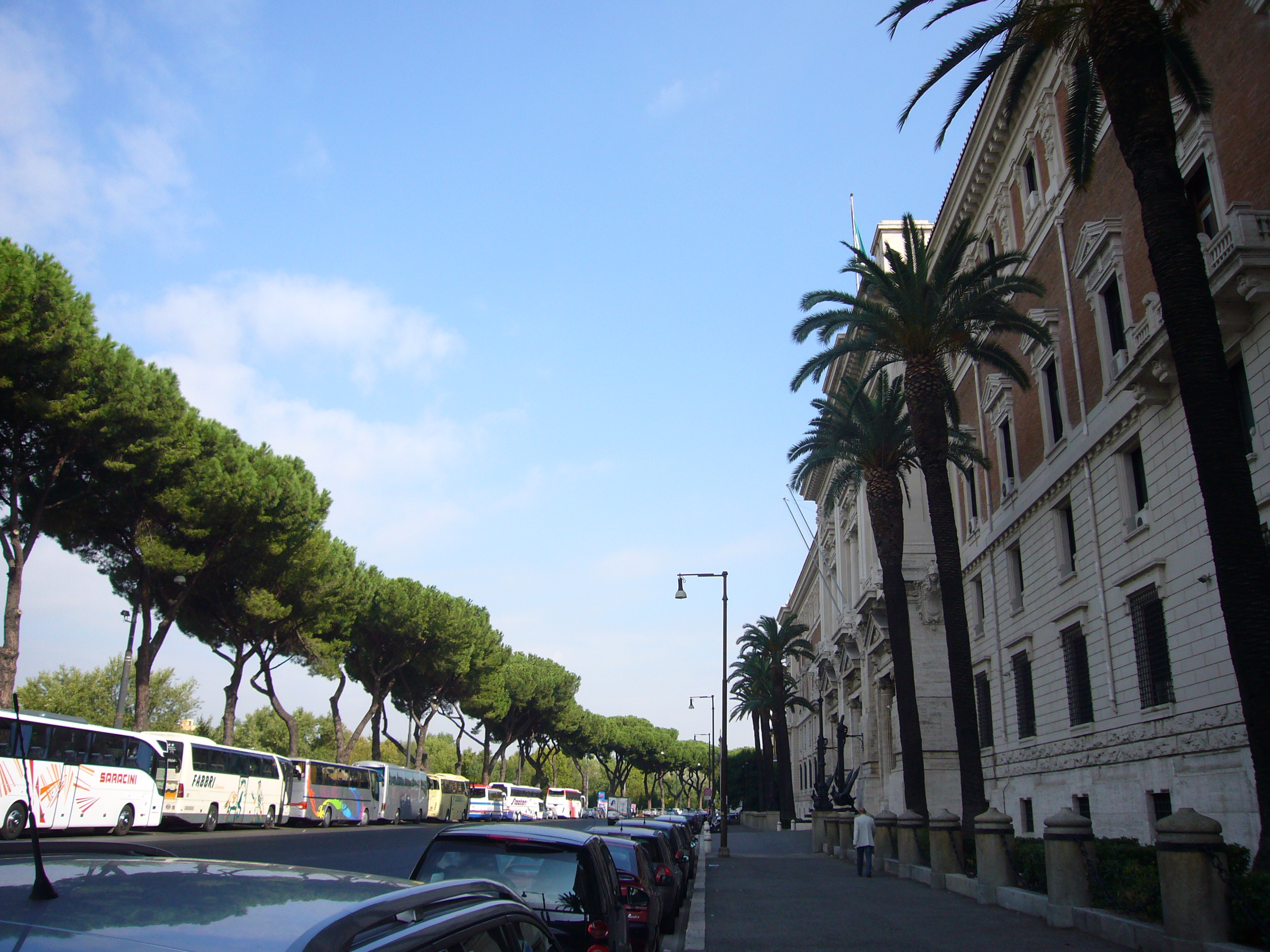 Roma, Lungotevere delle Navi, Ministero della Marina